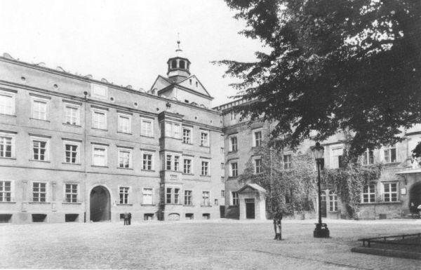 Stettin: Schloss der pommerschen Herzöge - Blick 1939 auf den Mittelflügel (links) und den Johann-Friedrichs-Bau (rechts, d.i. der Nordflügel) darin auch die lutherische Schlosskirche überragt von deren Glockenturm